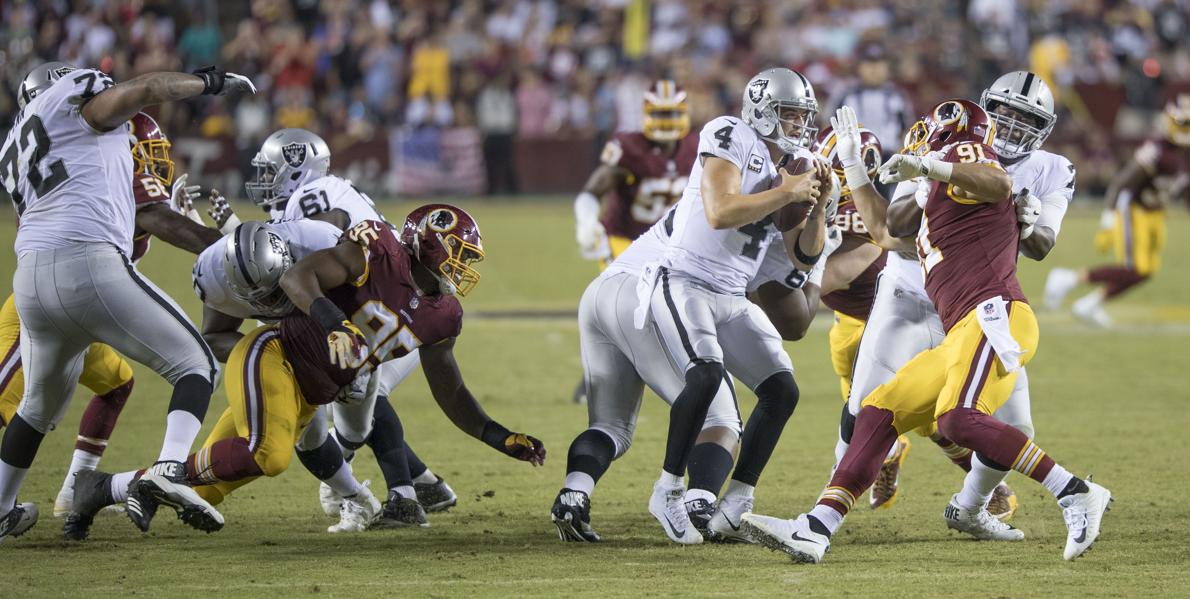 Raiders at Redskins 9/24/17